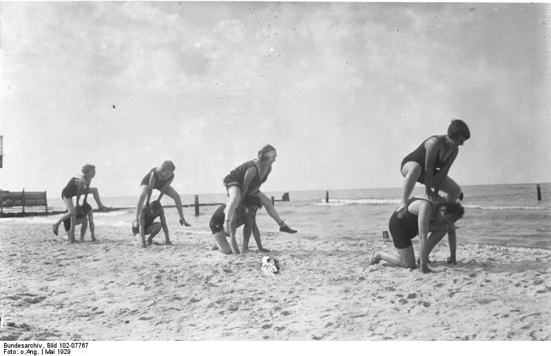 Die ersten Badegäste an der Ostsee! Die ersten badelustigen Grosstädter sind an der Ostsee eingetroffen und vergnügen sich am Strand im Bockspringen.